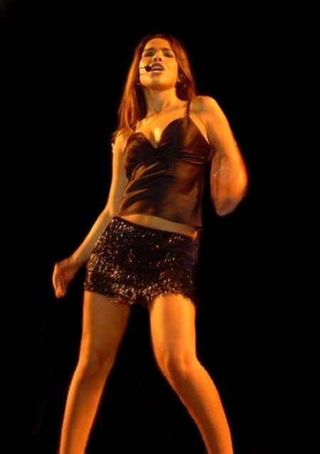 Wanessa Camargo na turnê W in Tour em Santo André/SP, em 2006.